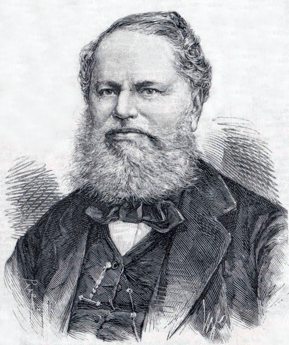 Simon Freiherr von Sina zu Hodos und Kisdia, vor 1876